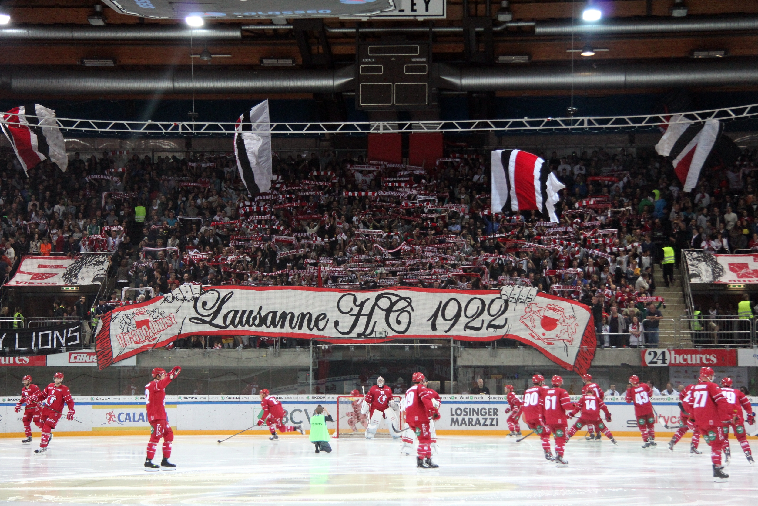 Tifo de la Section Ouest pour le début de match.